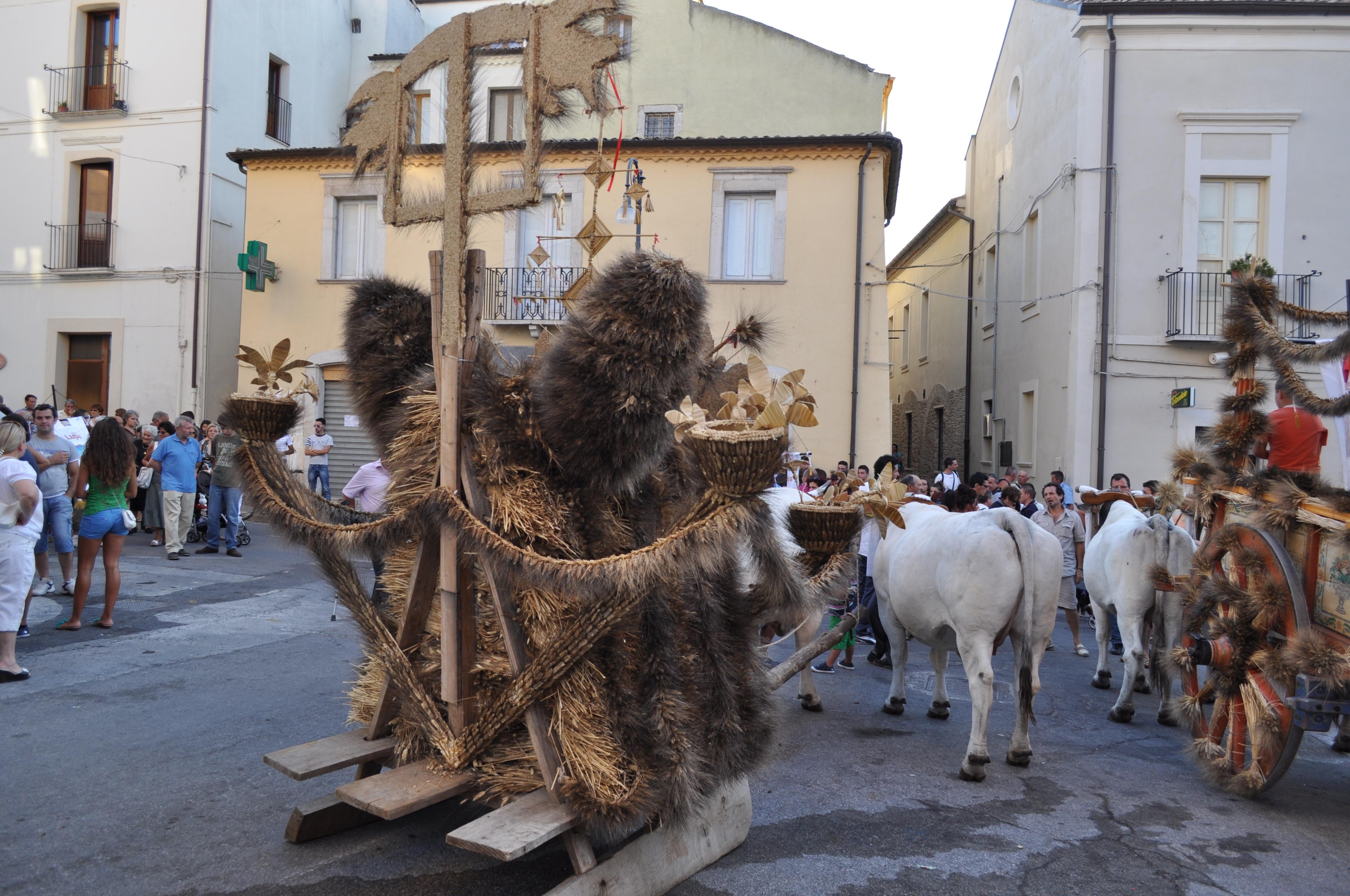 Traglia tirata dai buoi durante la Festa del Grano di Jelsi